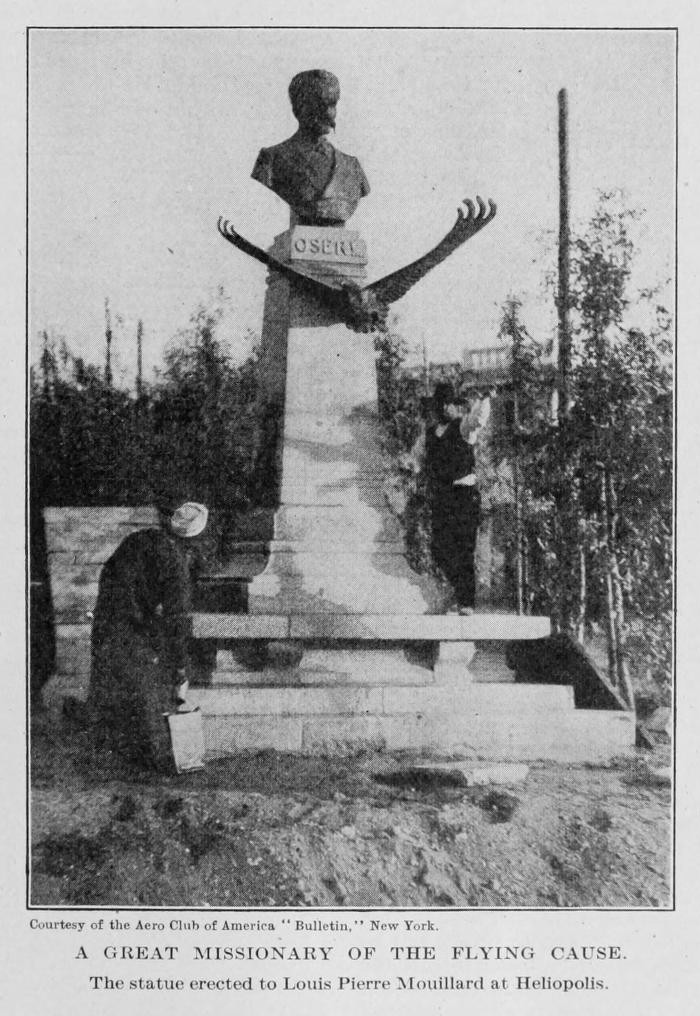 Memorial to Louis Pierre Mouillard at Cairo, 1912, by Guillaume Laplagne